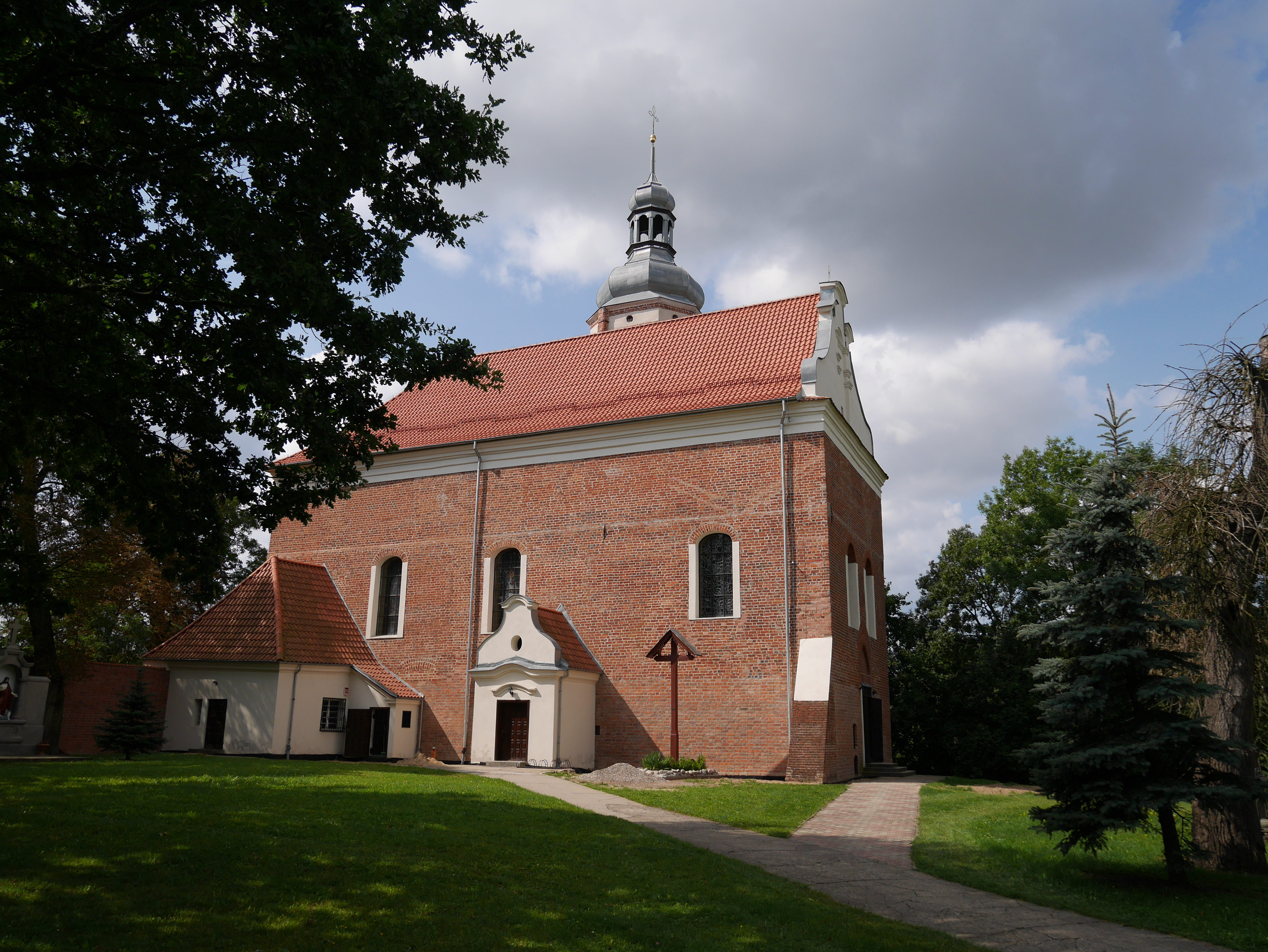 Krajenka, kościół par. p.w. śś. Mikołaja i Anny, 1744, 1837, 1882, l. 70. XX